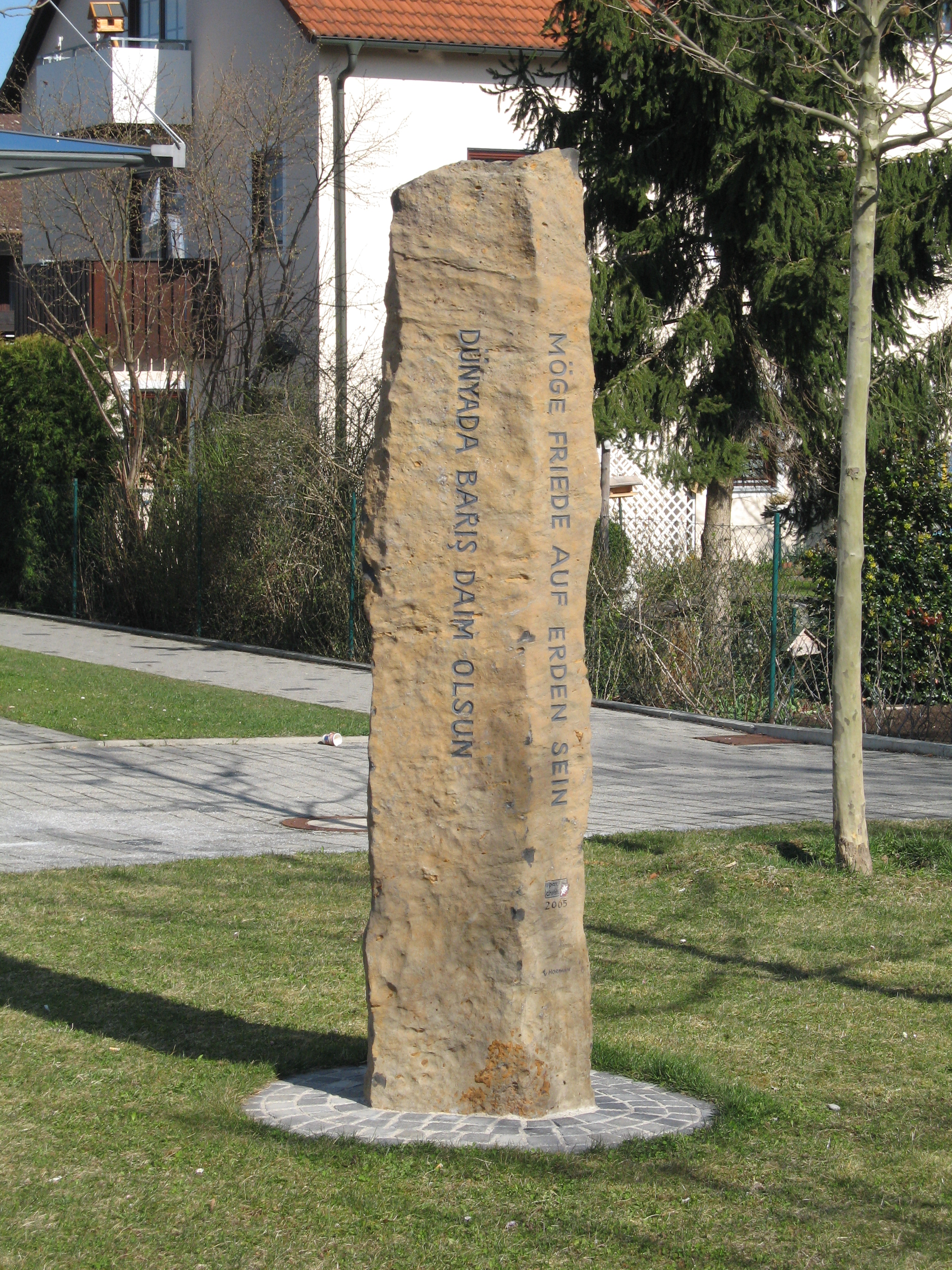 Friedenspfahl Friedenspfahl Unter dem Eindruck der Zerstörungen des 2. Weltkrieges hat der japanische Lehrer, Dichter und Philosoph Masahisa Goi (1916 – 1980) auf der Suche nach Wegen zum Frieden die World Prayers Society gegründet. Er war überzeugt davon, dass all unsere Worte und Gedanken Energie besitzen und wahrer Friede nur durch die Änderung unserer Gedanken, nämlich hin zu positiven Gedanken der Liebe und des Mitgefühls erreicht werden kann. Es war seine Idee, hölzerne Friedenspfähle mit quadratischem oder sechseckigem Querschnitt aufzustellen und die Worte „Möge Friede auf Erden sein“ in verschiedenen Sprachen auf deren Seitenflächen zu schreiben, um die Vorüber gehenden zu Gebet und Meditation anzuregen. Inzwischen stehen an die 200.000 Friedenspfähle in nahezu allen Ländern der Erde. Der Gilchinger Friedenspfahl wurde im Jahre 2005 von der hiesigen Pax-Christi-Gruppe gestiftet und am 19. November 2005 mit einem fröhlichen Fest eingeweiht. Er besteht aus einer Basalt-Säule, in deren fünf natürlich gewachsene Seiten der Friedenswunsch eingraviert ist, neben deutsch in den in Gilching seinerzeit am häufigsten gesprochenen Sprachen türkisch, serbo-kroatisch, italienisch und englisch. pax-christi-gilching